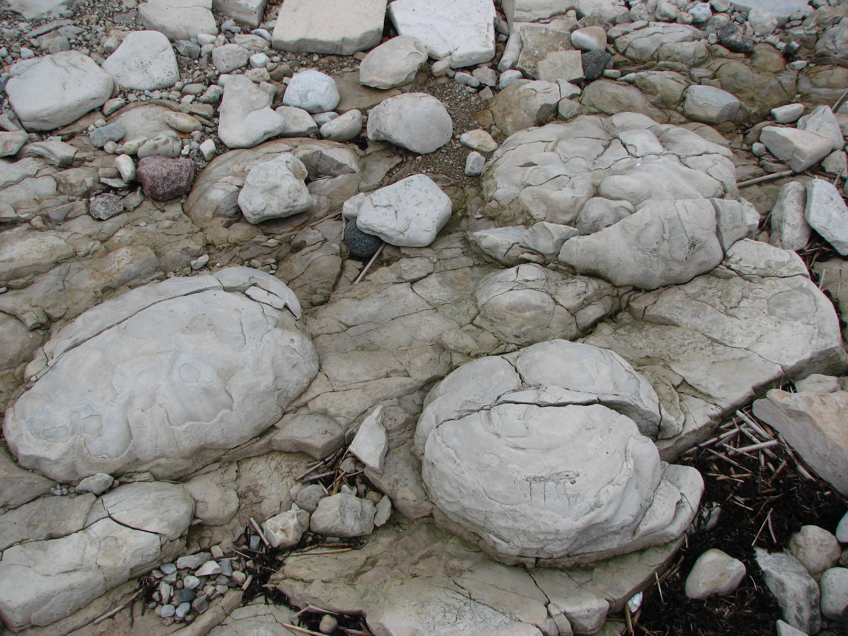 Kivistised (stromatopoorid) Kübassaare poolsaarel, pildistatud 2010. aasta juulis.